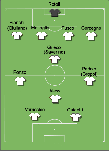 Formazione dello Spezia Calcio, stagione 2005-06, promozione in Serie B